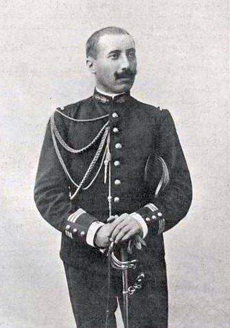 Le capitaine Émile Coste, champion olympique de fleuret en 1900.